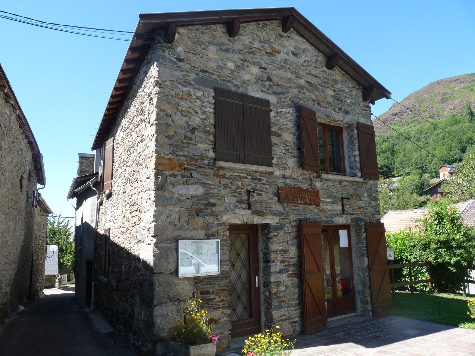 Mairie d'Ignaux, Ariège, France